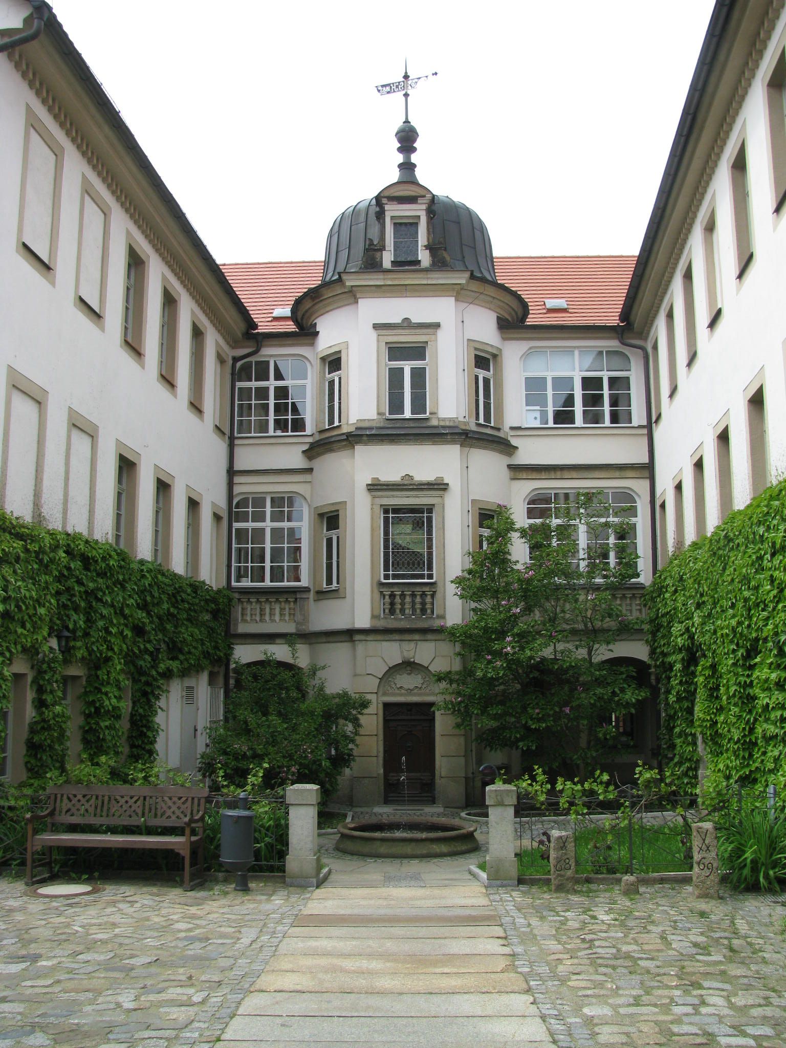 Der sogenannte Bischofssitz wurde nach dem großen Bischofswerdaer Stadtbrand von 1813 im Jahr 1818 auf Veranlassung Gottlob Friedrich Thormeyers in der erhaltenen klassizistischen Form errichtet. Die zweiflügelige Hofumbauung wurde später ergänzt. In der mittleren Etage des Hauptgebäudes befindet sich die Stadt- und Kreisbibliothek.